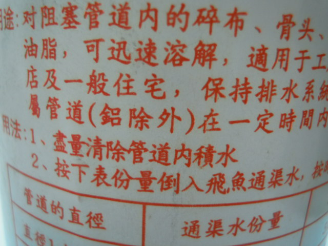 強酸性通渠水會與鋁管表面的氧化鋁發生反應。